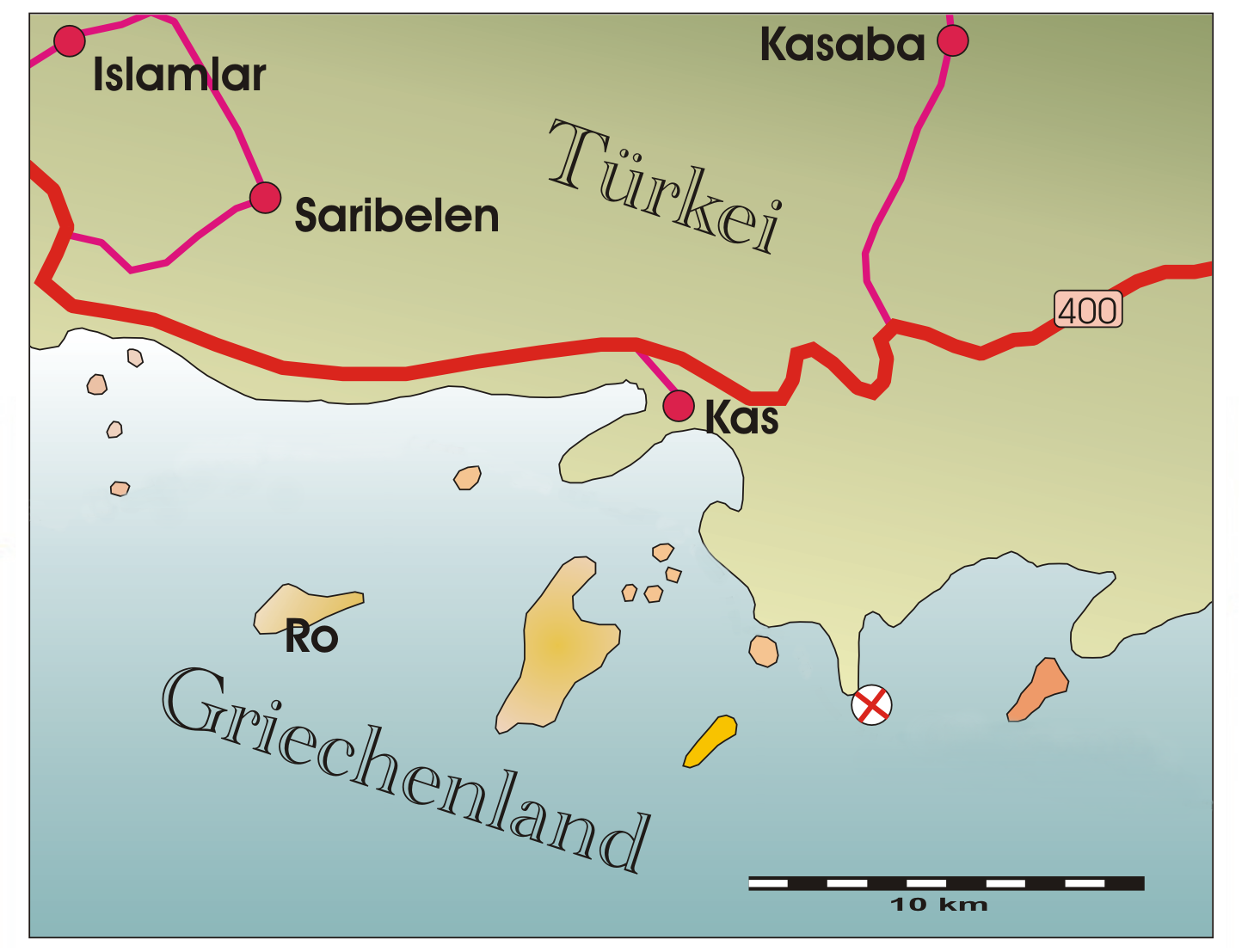 Bildbeschreibung: Fundort Schiff von Uluburun Quelle: Selbst gezeichnet Fotograf/Zeichner: presse03 Datum: 17.03.2006